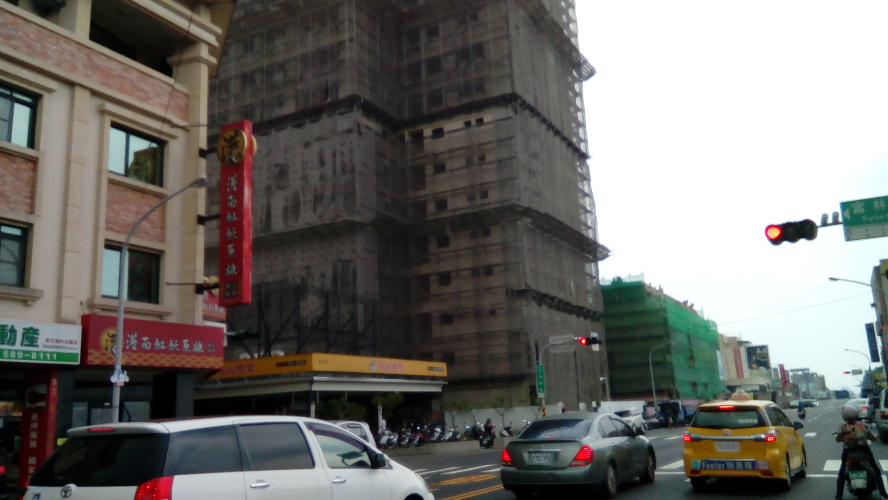 同上